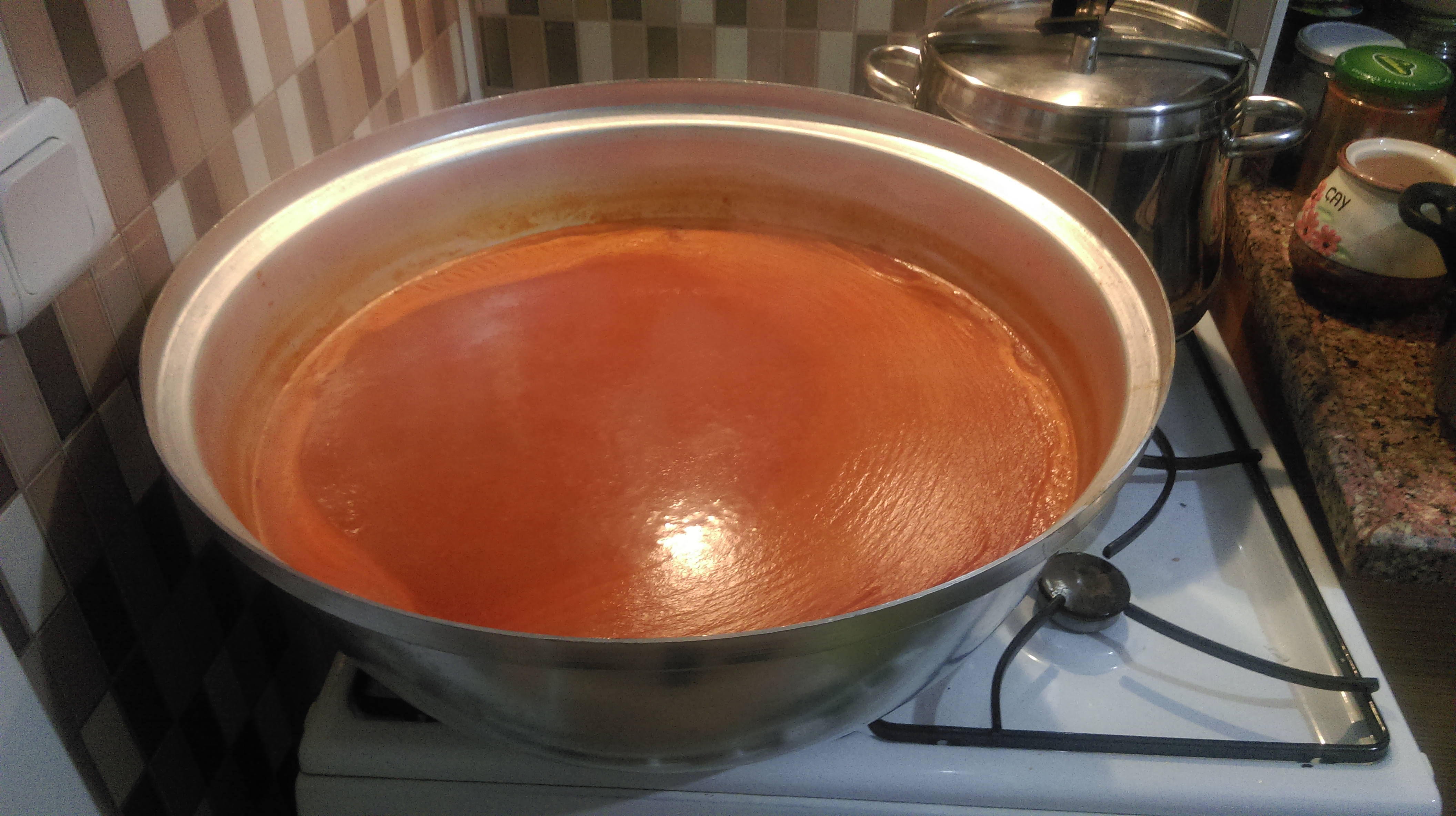 Arabaşı çorbası.